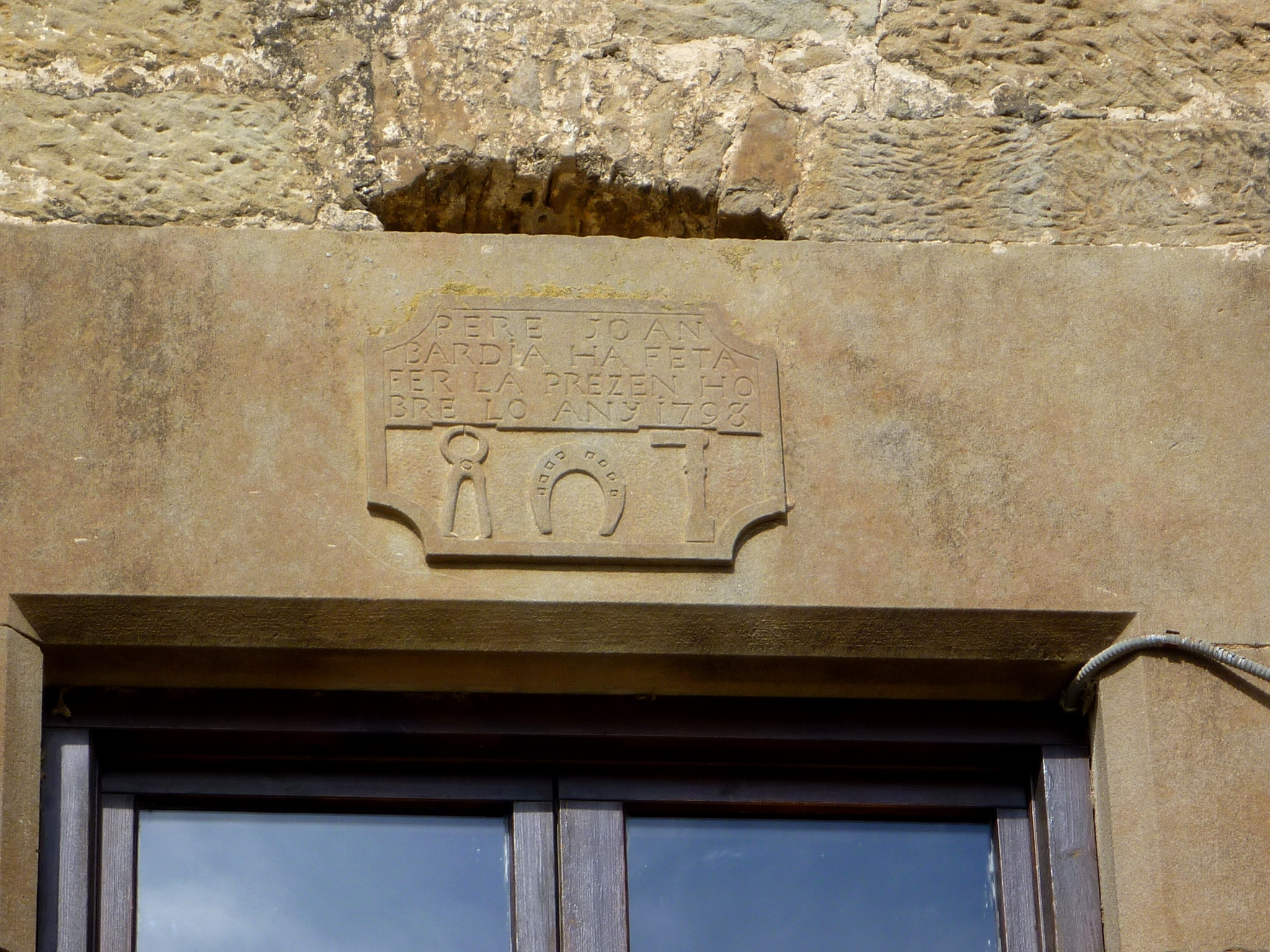 Masia de la Carral (Riner): dintell del balcó de la façana